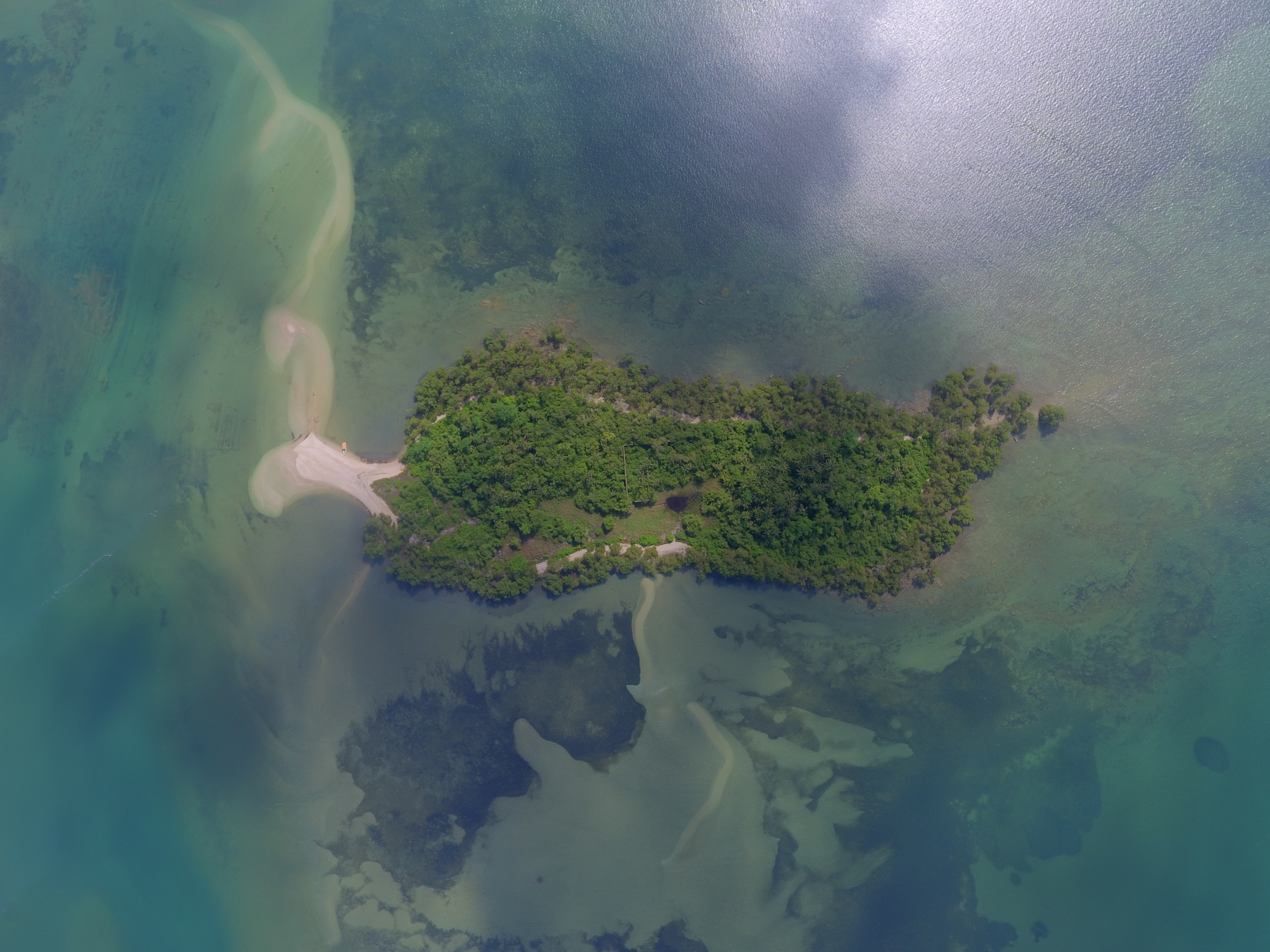 Fotografia Aérea, datada de 14 de abril de 2017, a 500 metros de altitude.